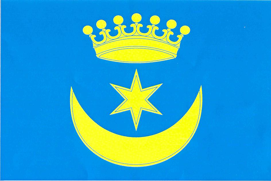 Vlajka obce Volanice